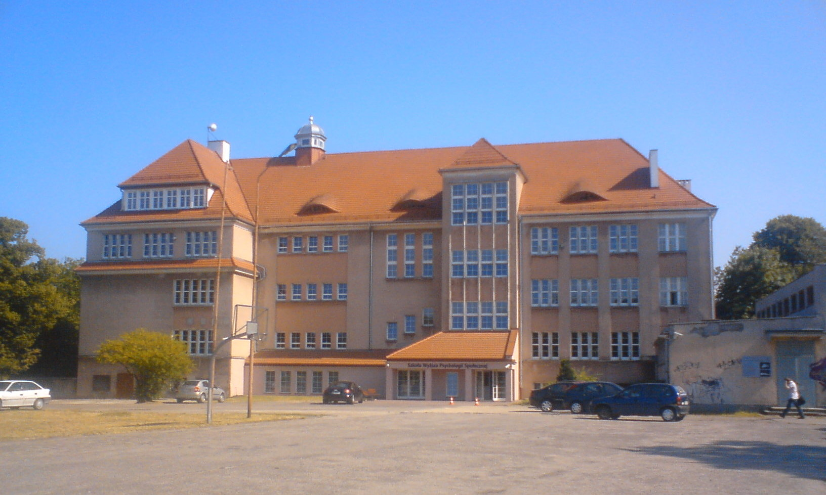 Szkoła Wyższa Psychologii Społecznej w Sopocie